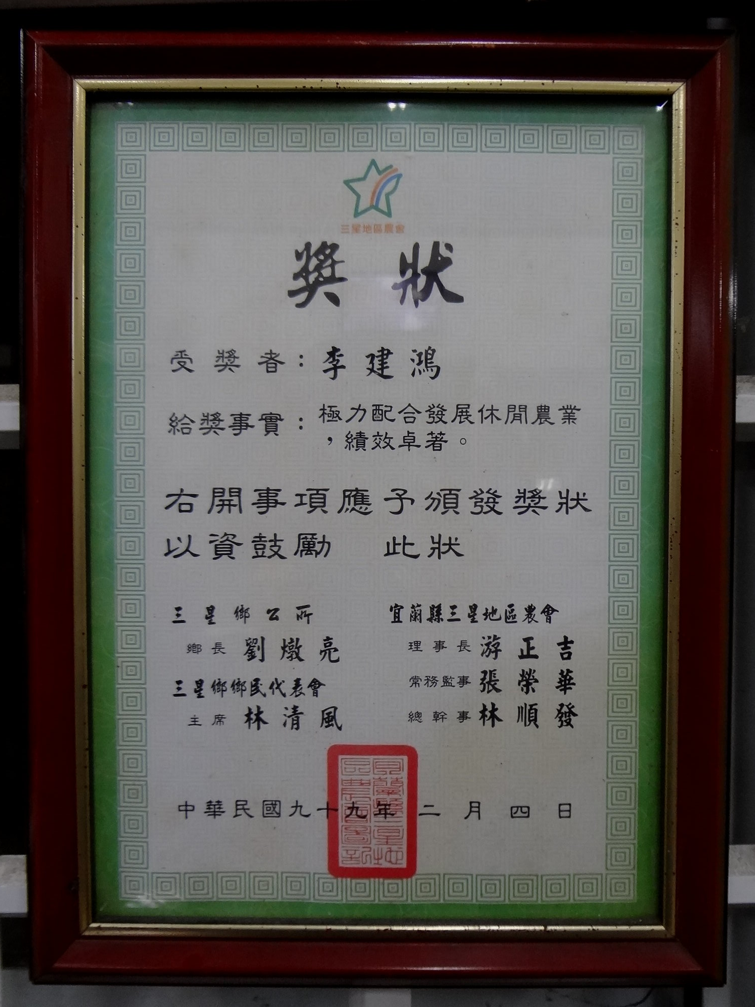 2010年2月4日宜蘭縣三星地區農會獎狀。